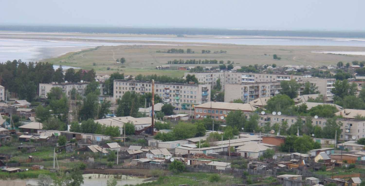 Поселок Малиновое Озеро - Обзорная Панорама